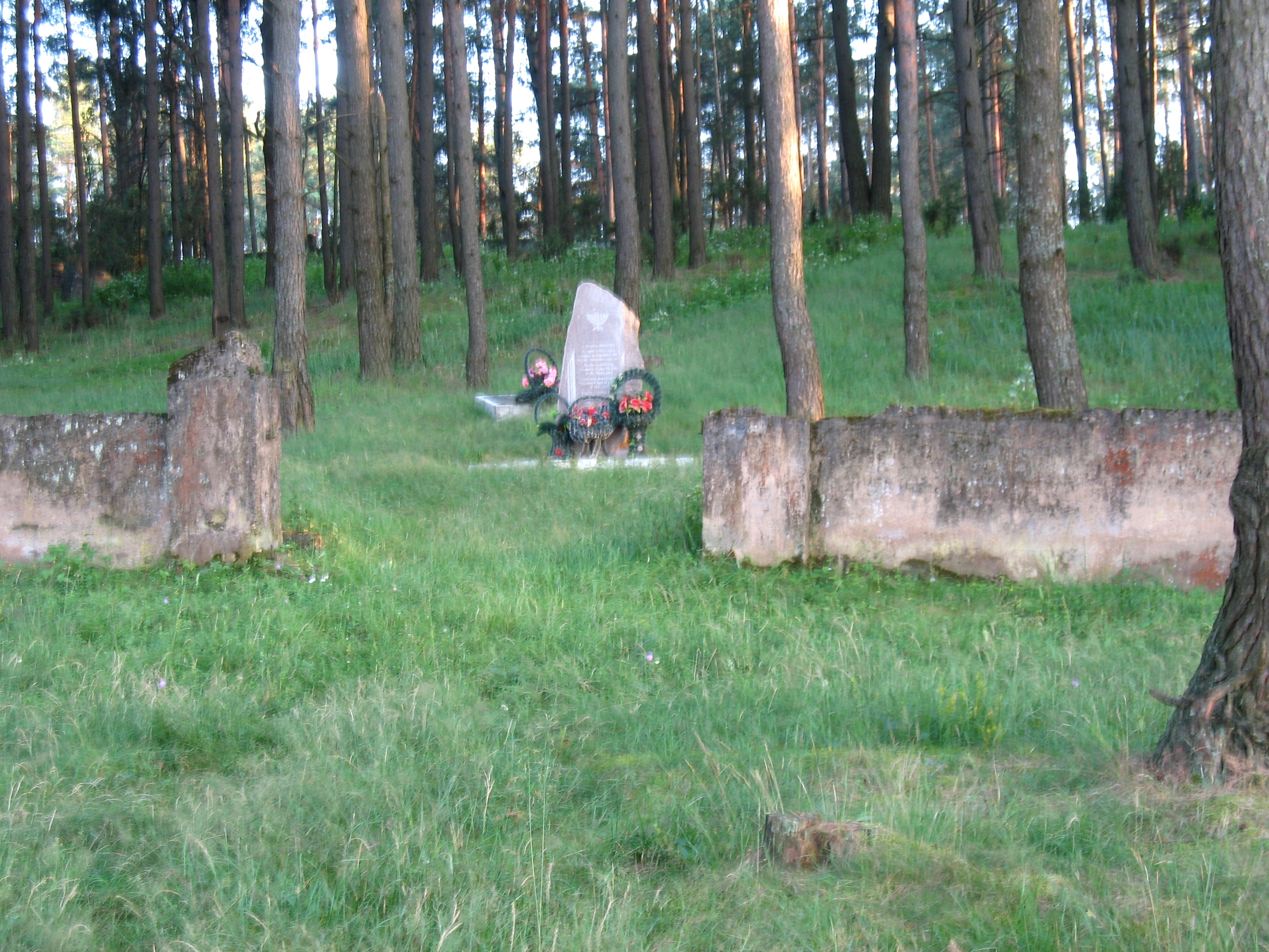 Памятник на братской могиле евреев деревни Новый Свержень Столбцовского района Минской области, убитых нацистами во время Холокоста.